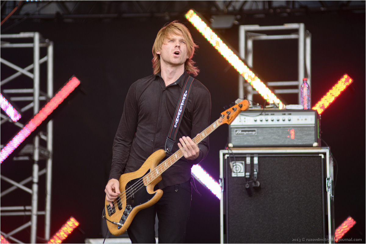 Максим Андрющенко, группа "Би-2, фестиваль "Рок над Волгой" 2013